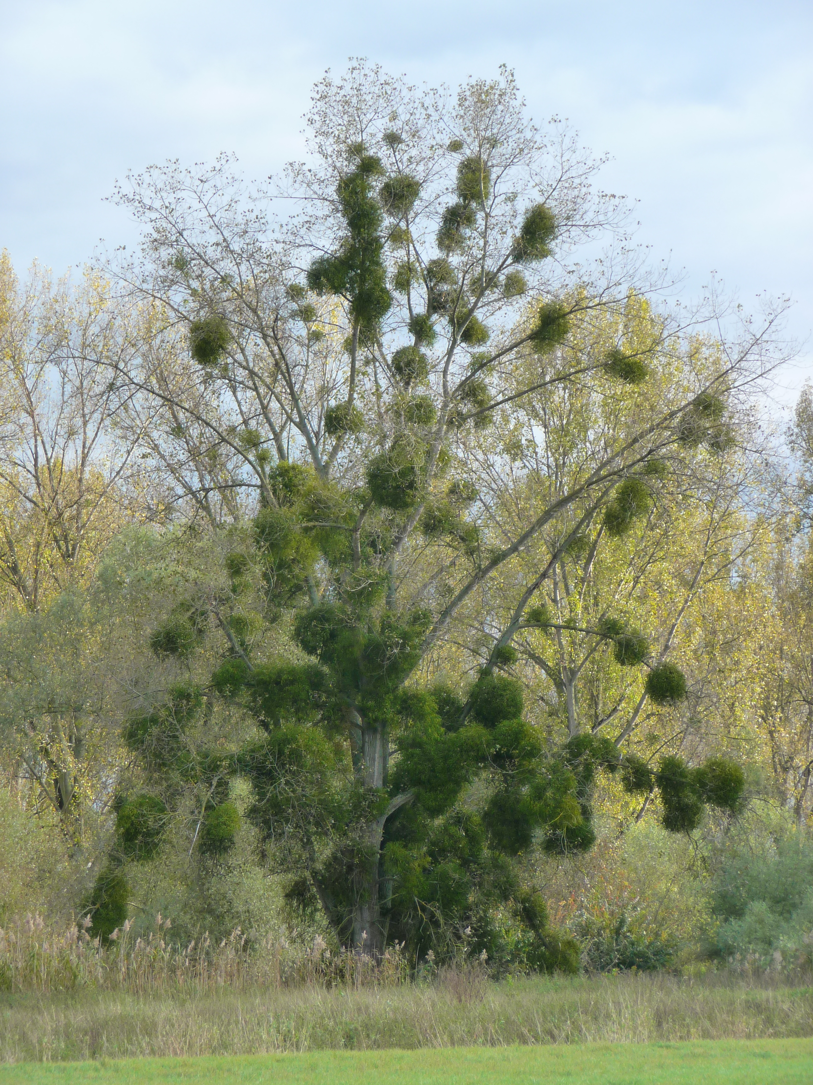 Europa-Reservat Kühkopf-Knoblochsaue (Hessen, Deutschland)